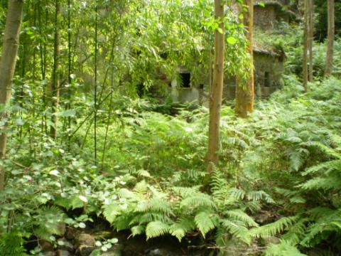 Muiño da Rocha en Xove - Lugo.